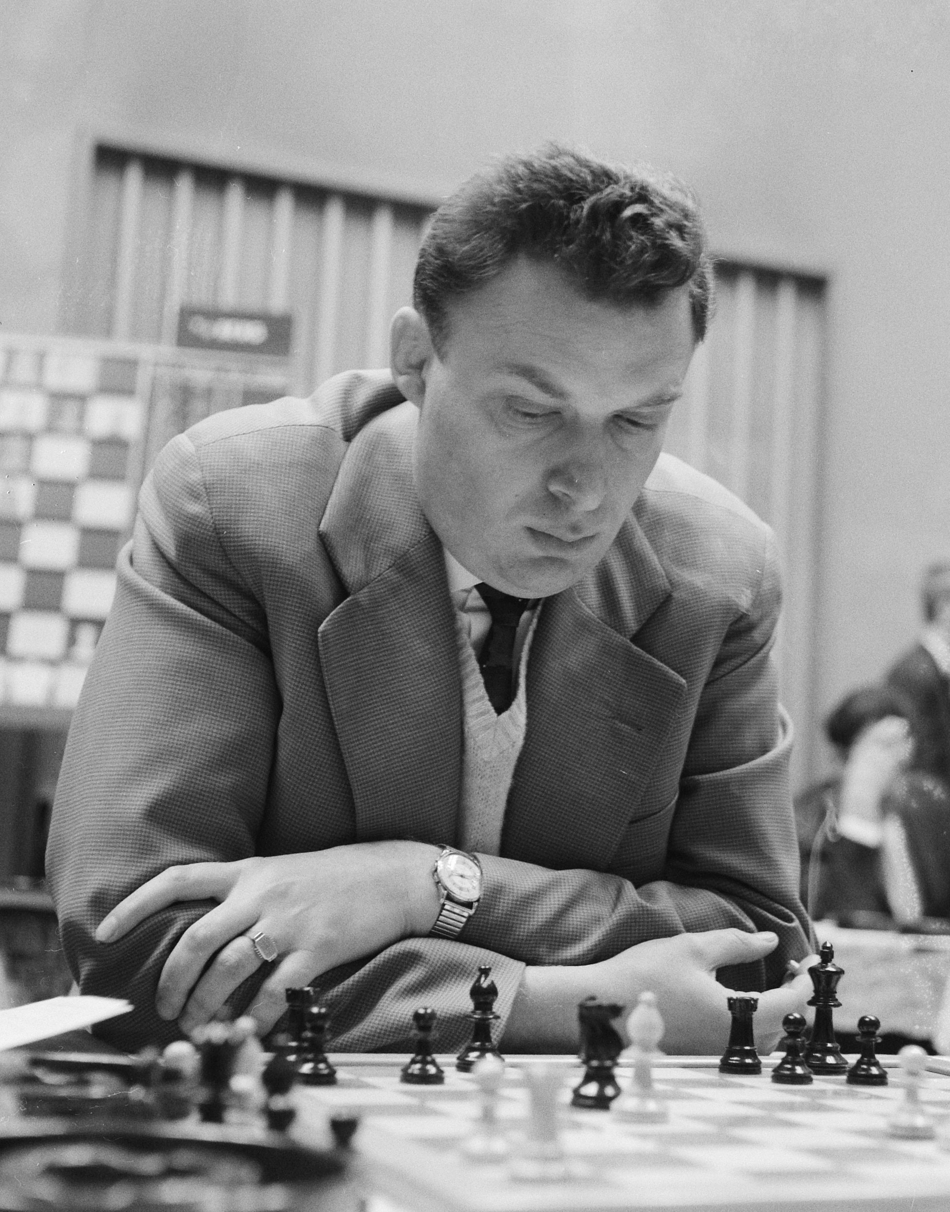 28e Hoogoven schaaktoernooi te Beverwijk, dr M. Filip (Tsjechoslowakije).